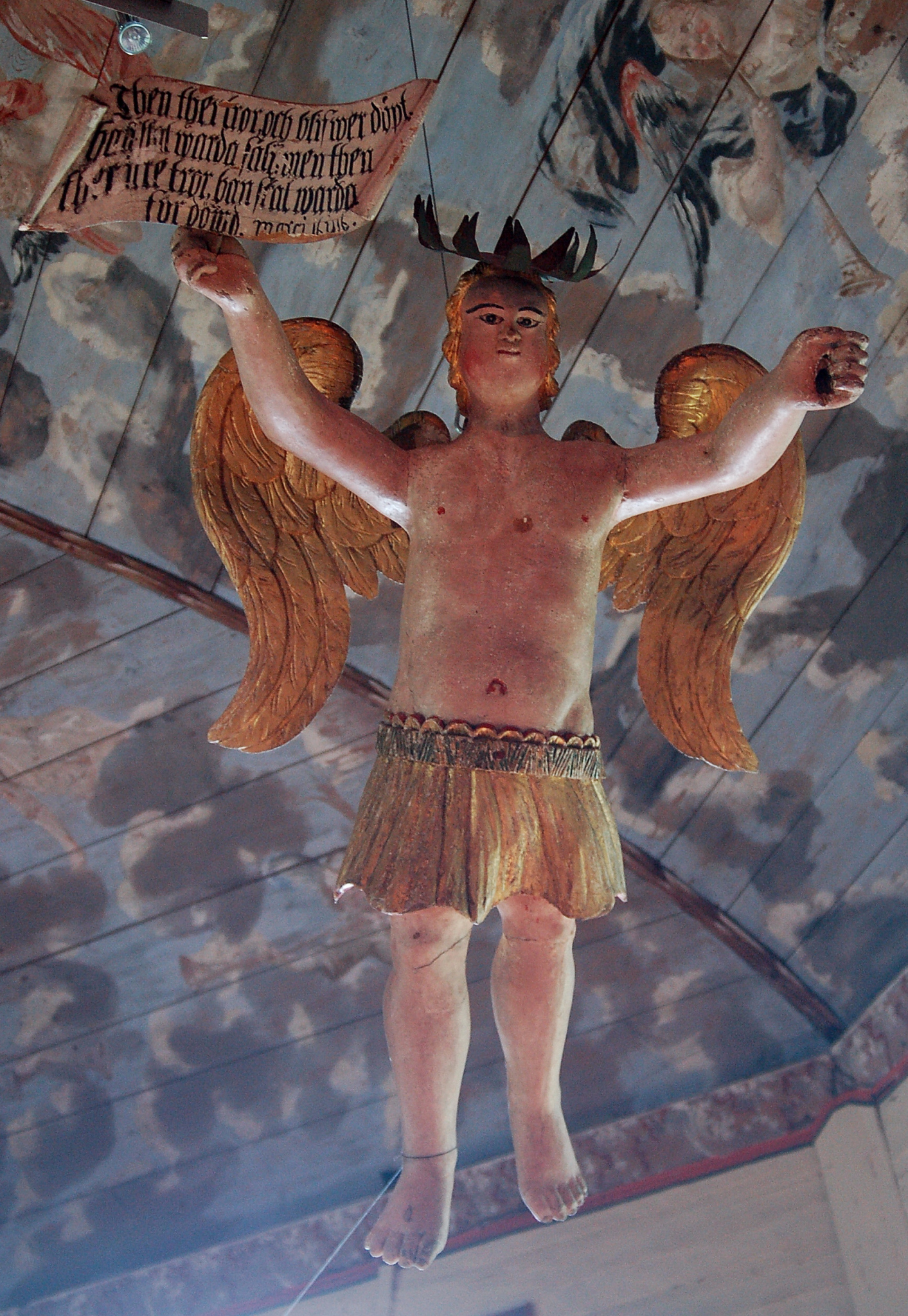 Dopängel hängande i taket i Nysunds kyrka, Åtorp Sweden. Ångeln föreställer Johannes döparen och skapades av Isak Schullström 1759.